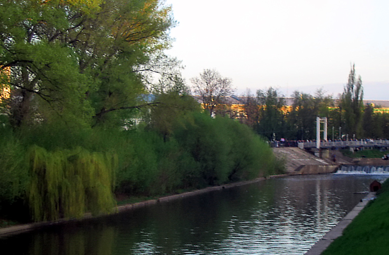 Oryol